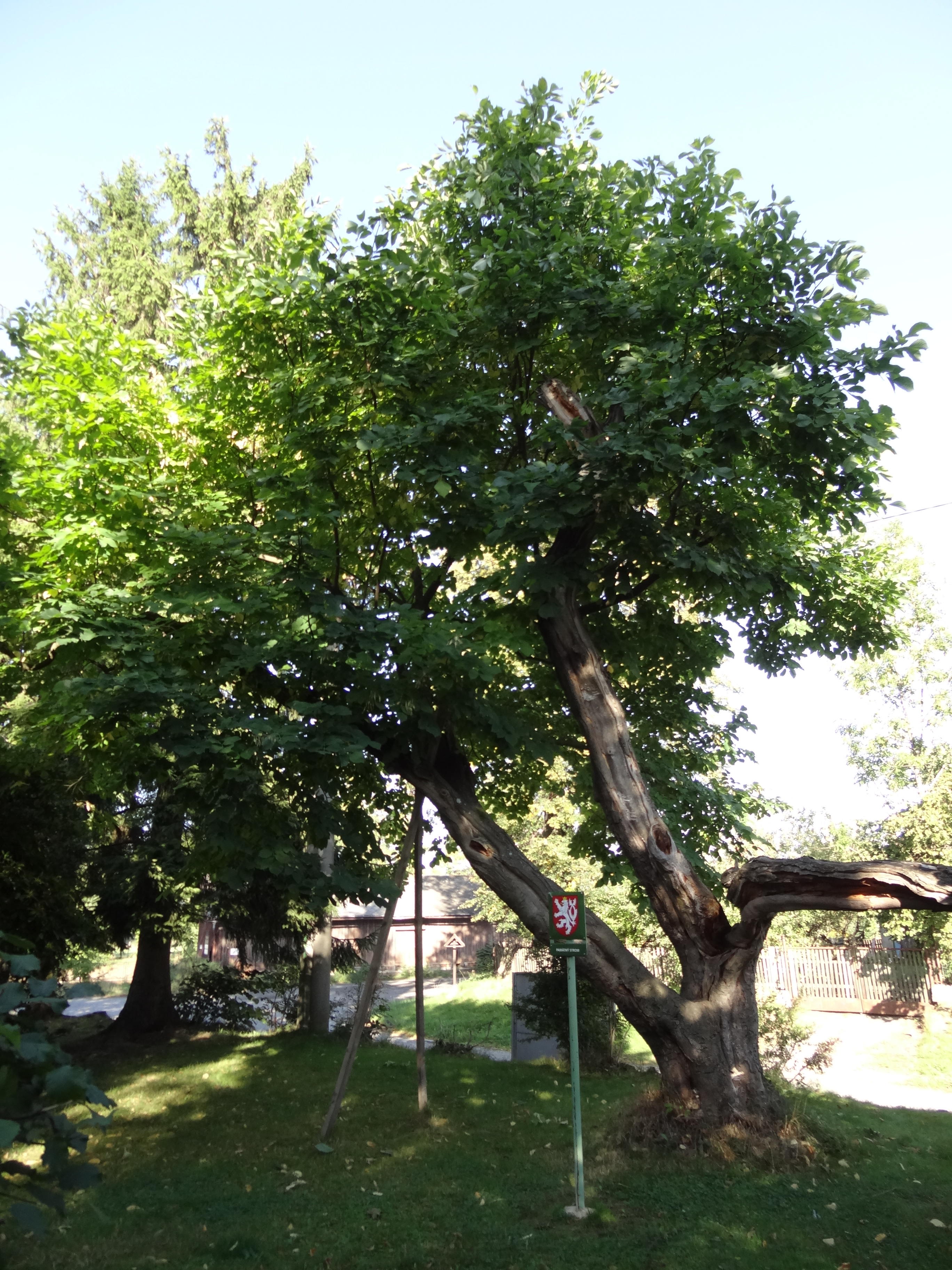 Nové Město pod Smrkem - památný křehovětvec žlutý v parku před vilou čp. 853